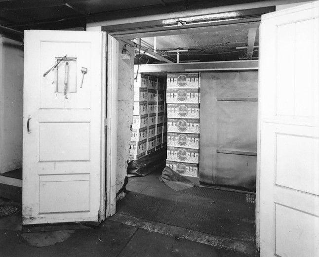 Bananmogningsrum från förr, Banan-Kompaniet